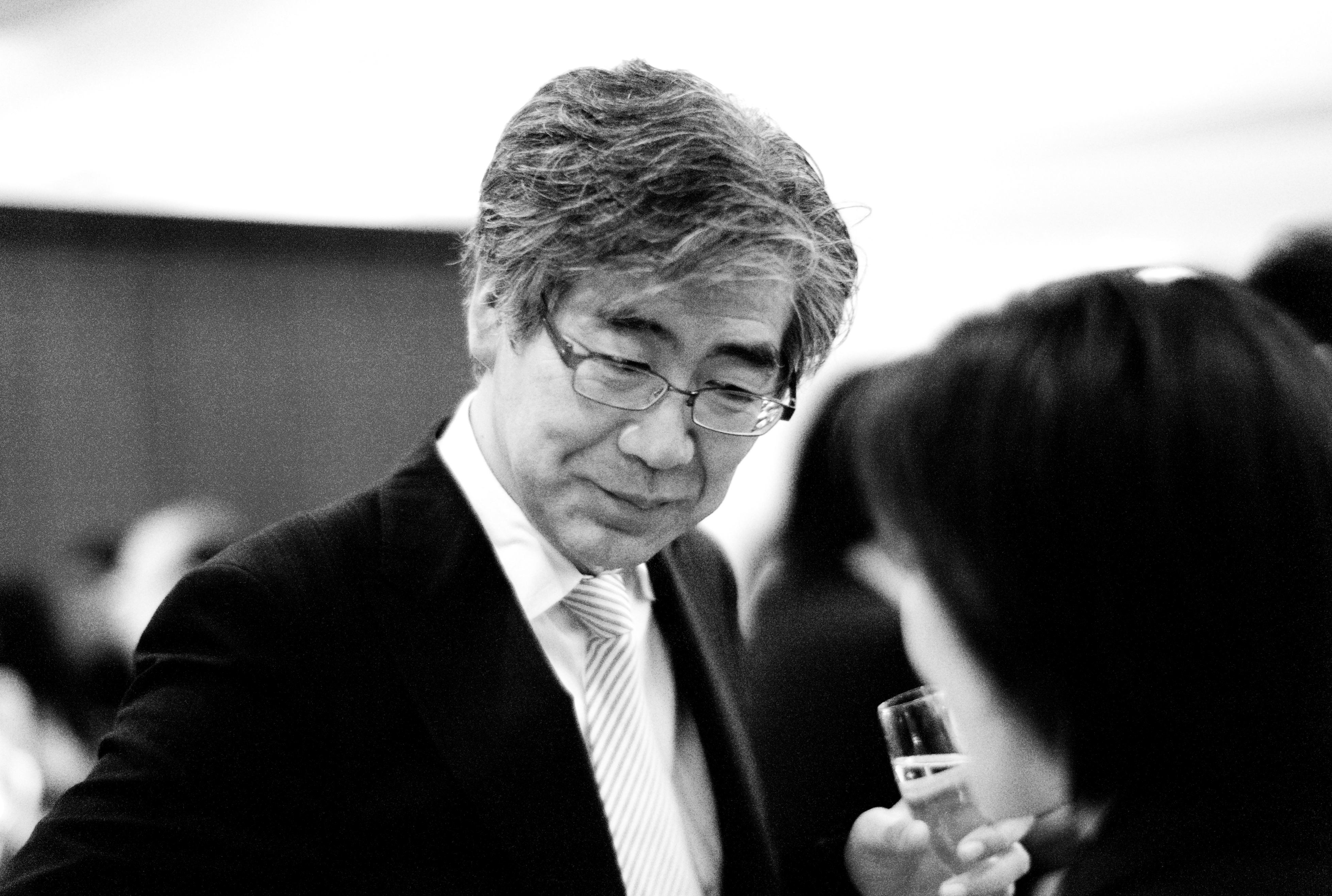 Mori Art Museum director